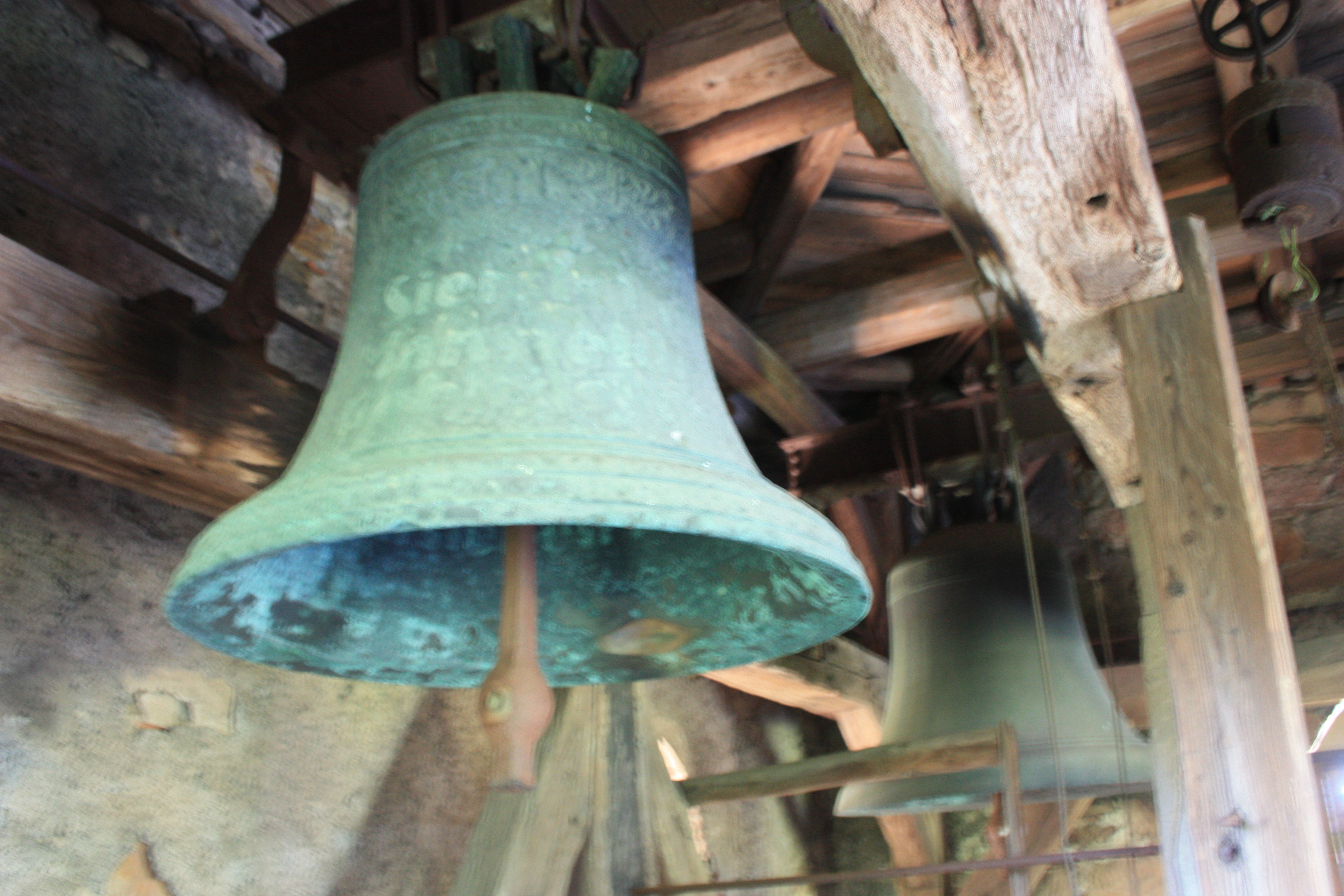 die beiden Kirchenglocken von Siersleben